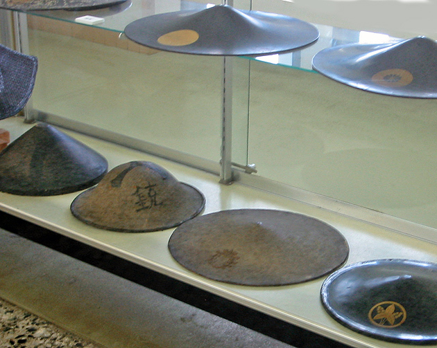 岐阜城にて